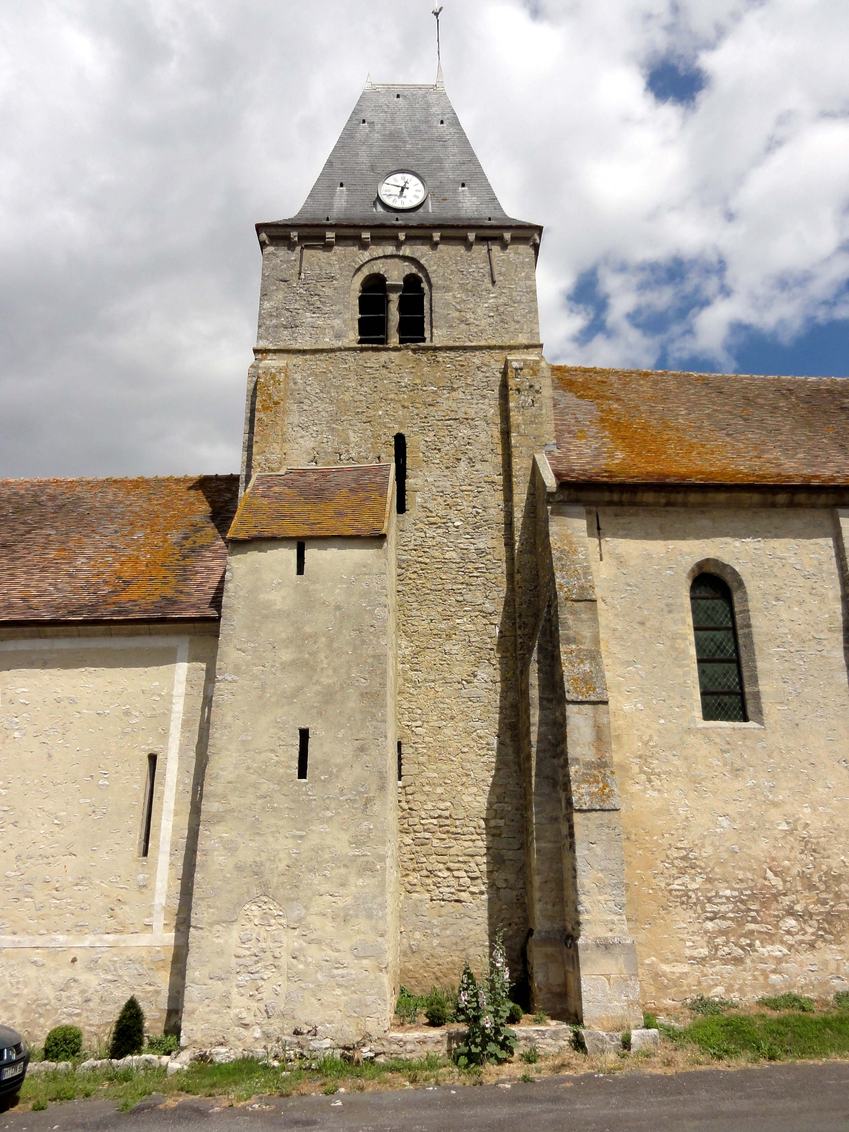 Église Saint-Martin d'Omerville (voir titre).